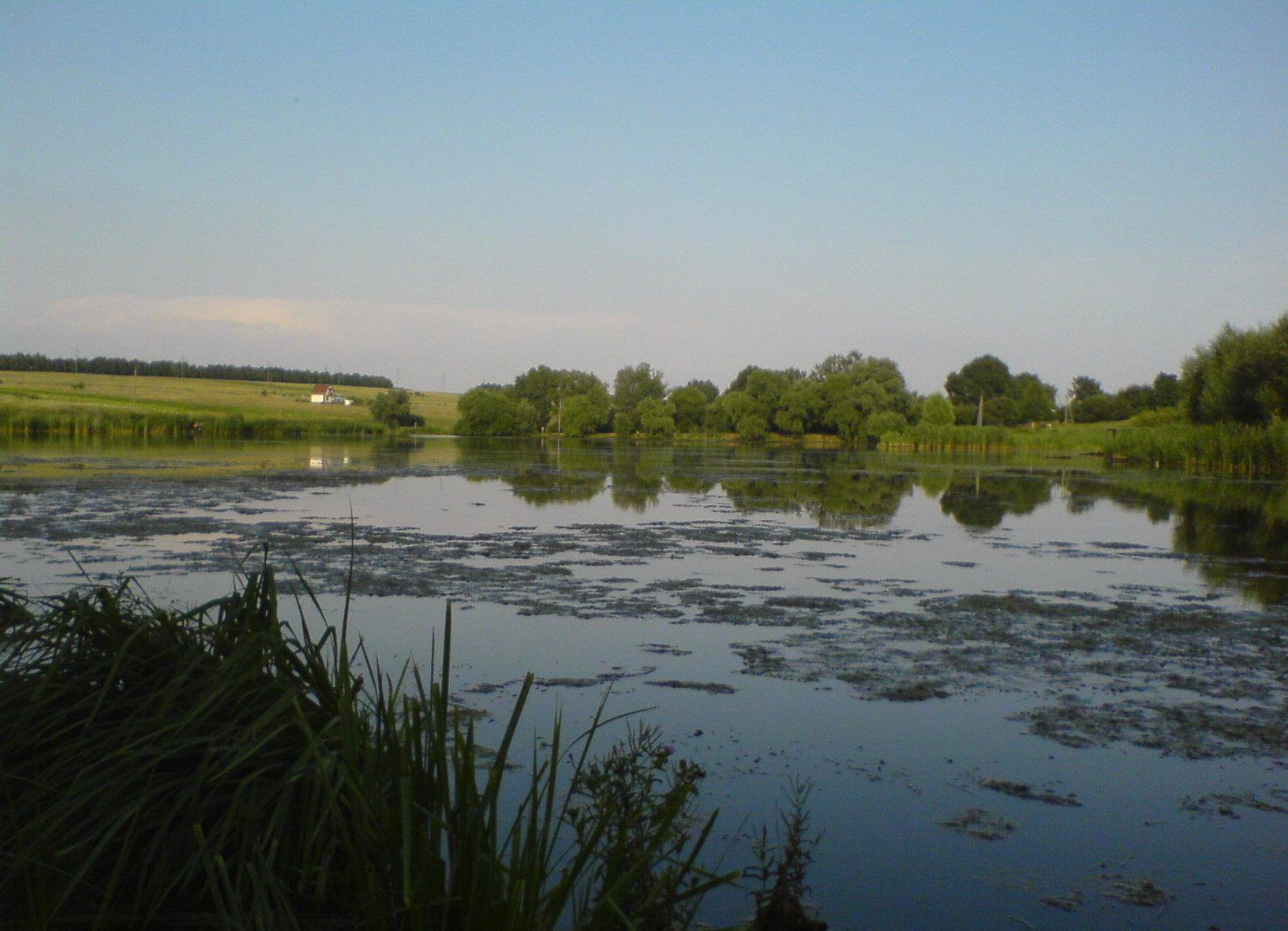 Пруд Джерелянский на реке Люботинке в Харьковской области